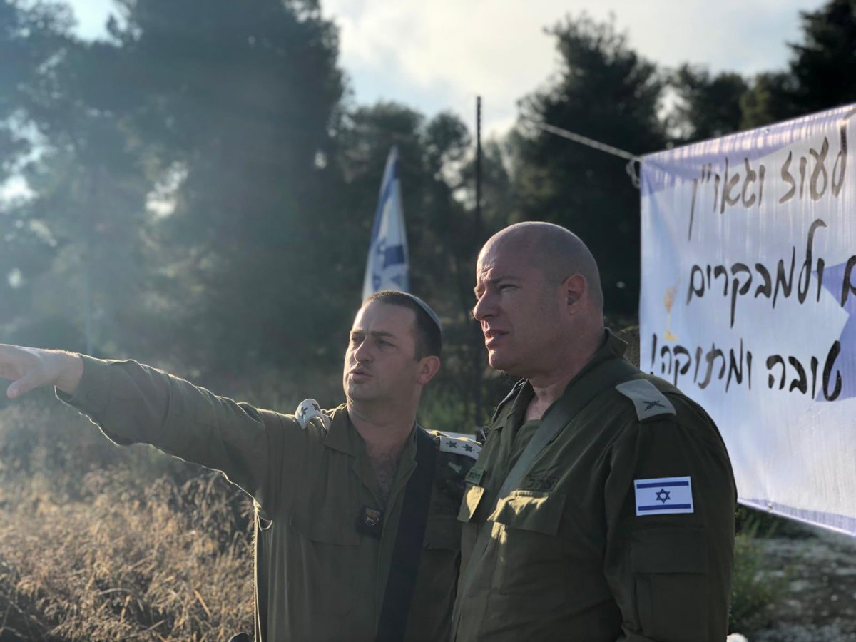 הדי זילברמן עם מח״ט עציון, אל״ם דוד שפירא ולוחמי חטיבת כפיר, שתופסים קו בגזרה.